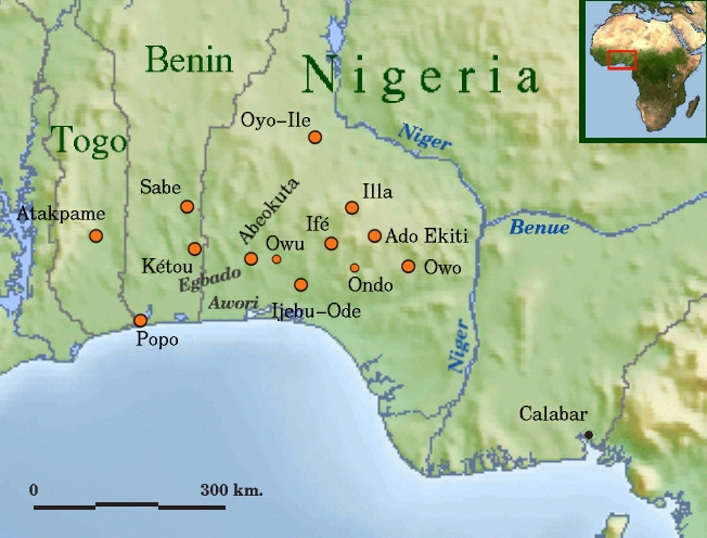 Map Medieval Yoruba cities